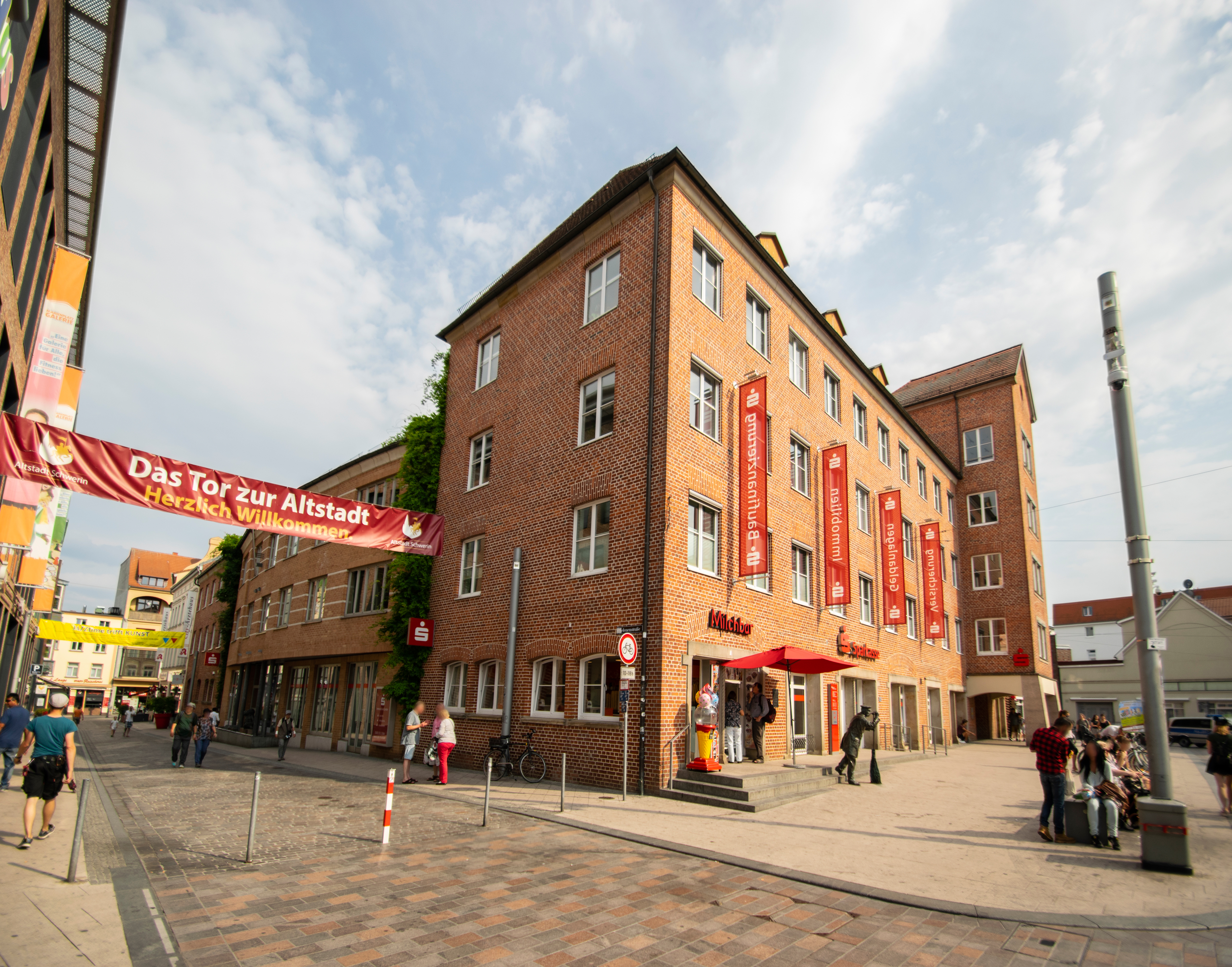 Sparkasse Mecklenburg-Schwerin, Hauptsitz am Marienplatz in Schwerin